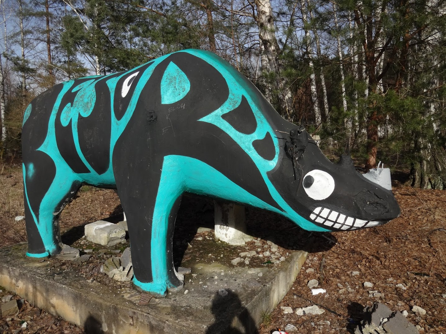 Graffiti na betonowym nasorożcu w opuszconym centrum medycy alternatywnej w Kuleszówce